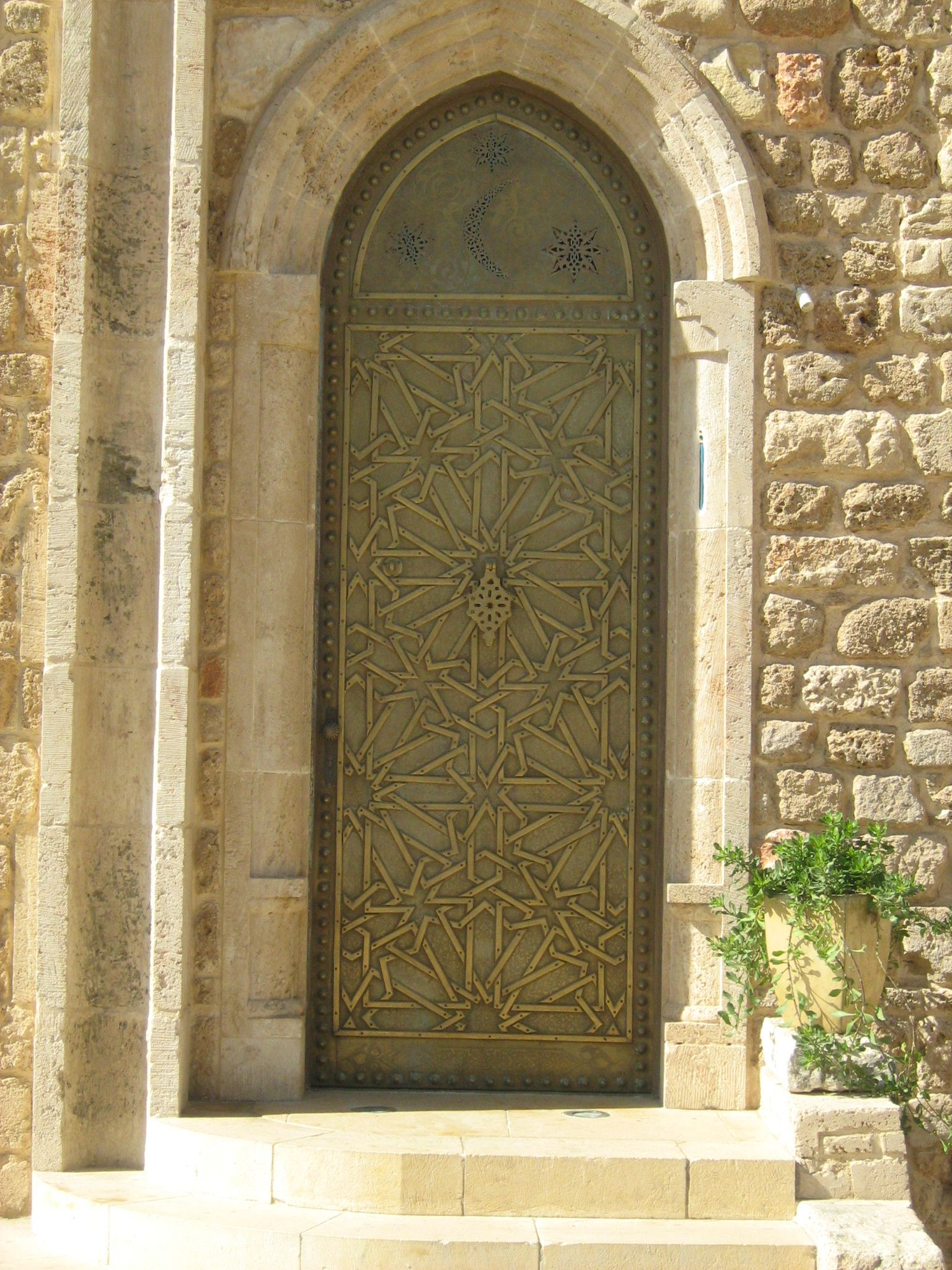 יפו